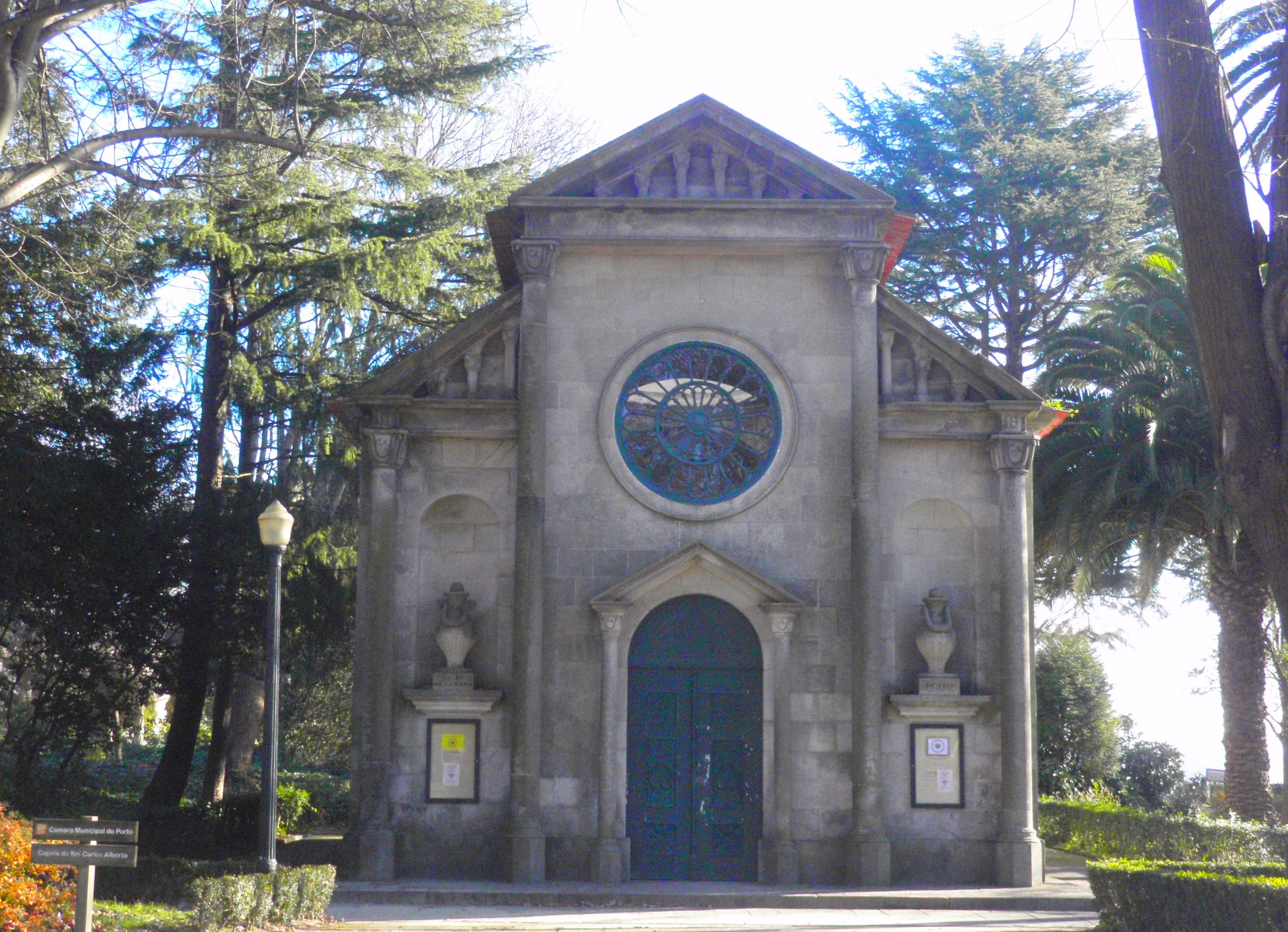 Oporto (Portugal)